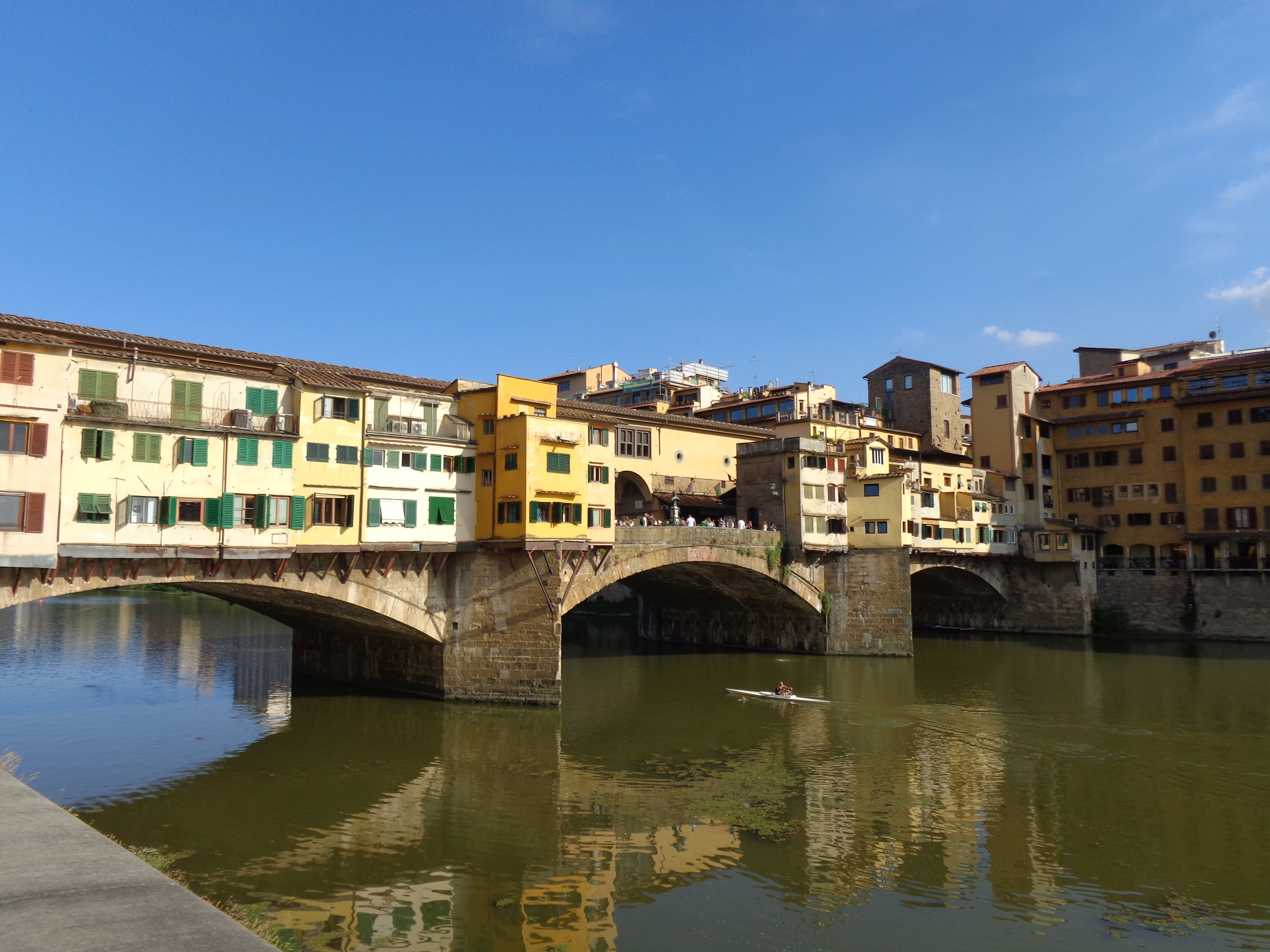 Ponte Vecchio